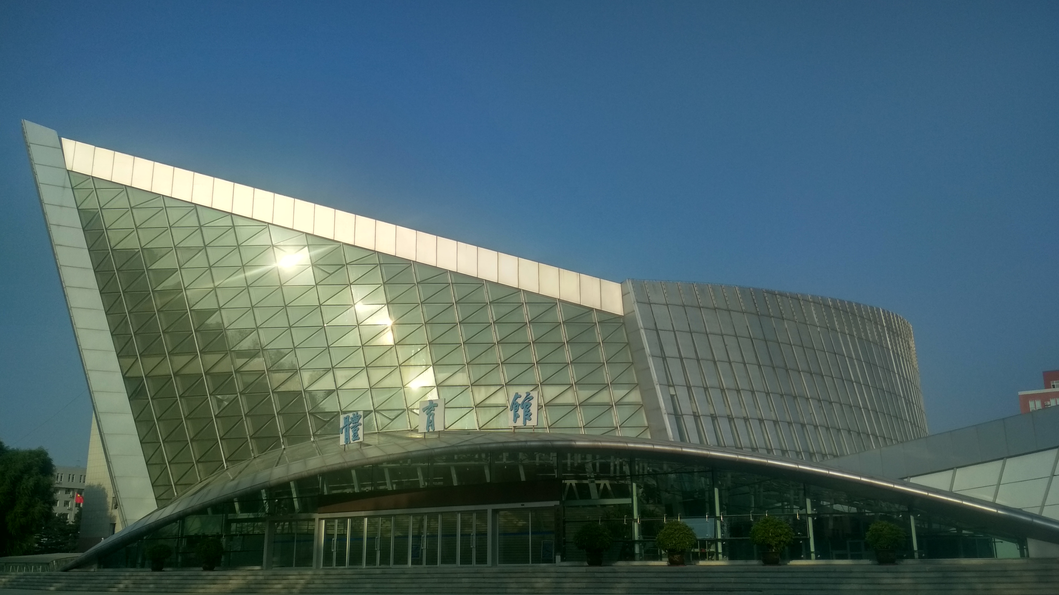 东北师范大学本部体育馆